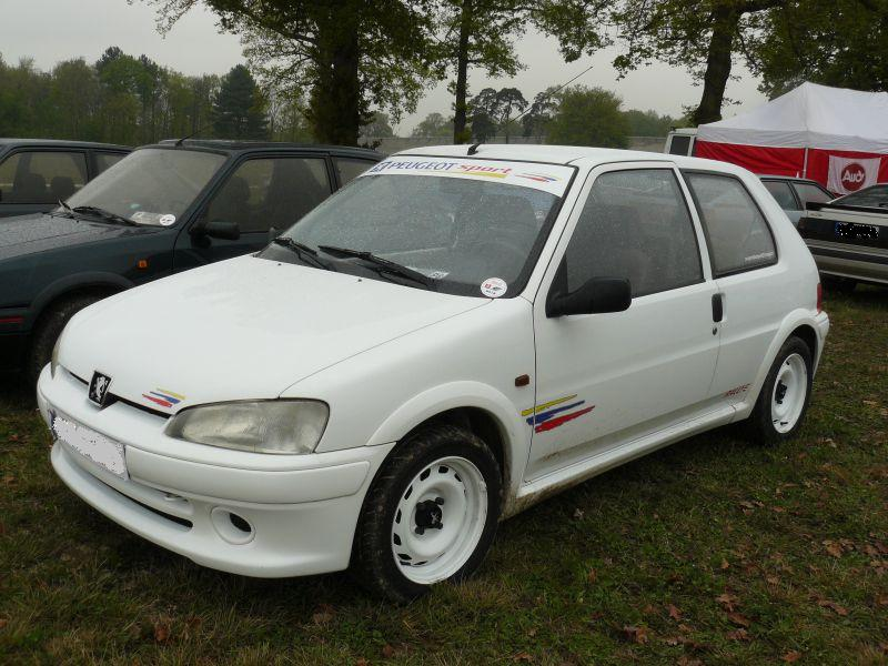 Photo prise à Montlhery en avril 2012